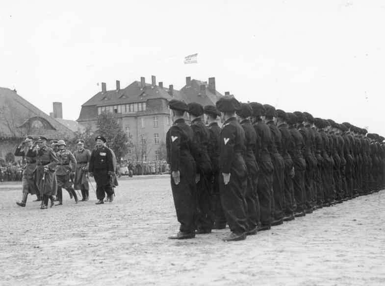 Einzug der Panzerwagentruppen in ihren neuen Standort Wünsdorf am 20.10.35 General Fessmann schreite auf den Kasernenhof die Front der Truppe ab 34389-35